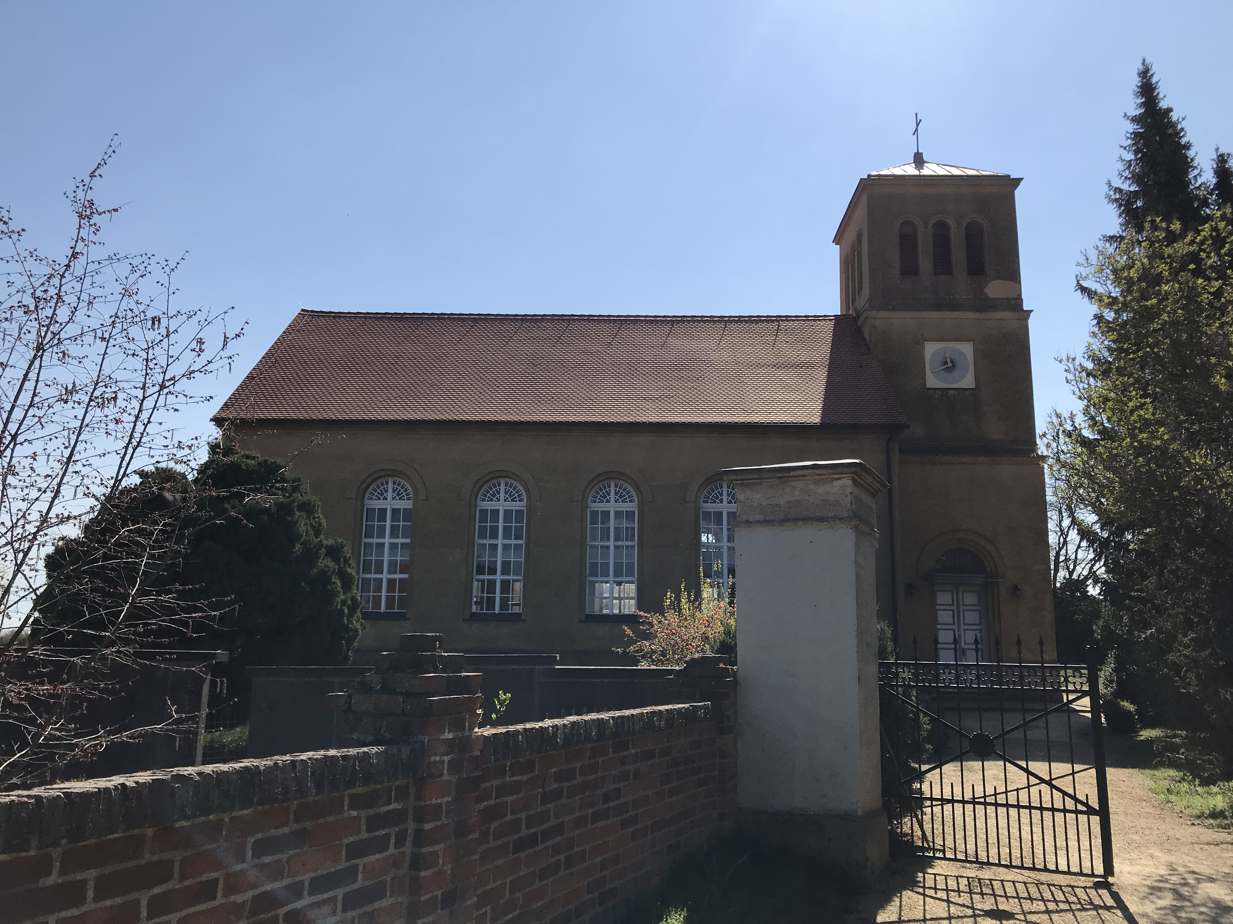 Die Dorfkirche Lütte ist eine Saalkirche aus dem Jahr 1842 in Lütte, einem Ortsteil der Stadt Bad Belzig im Landkreis Potsdam Mittelmark. Im Innern hängt unter anderem ein Gemälde aus dem Anfang des 17. Jahrhunderts.